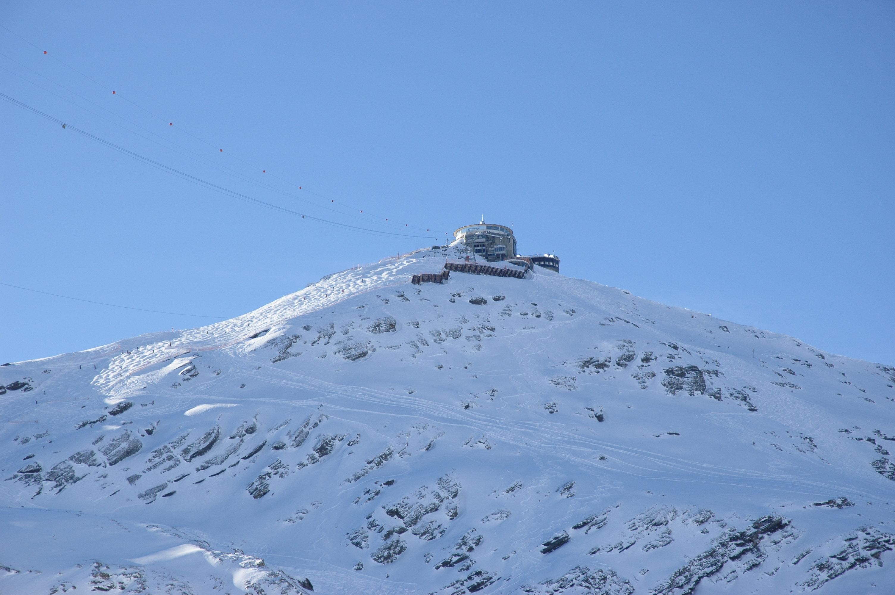 Schilthorn, Bernese Alps, Switzerland